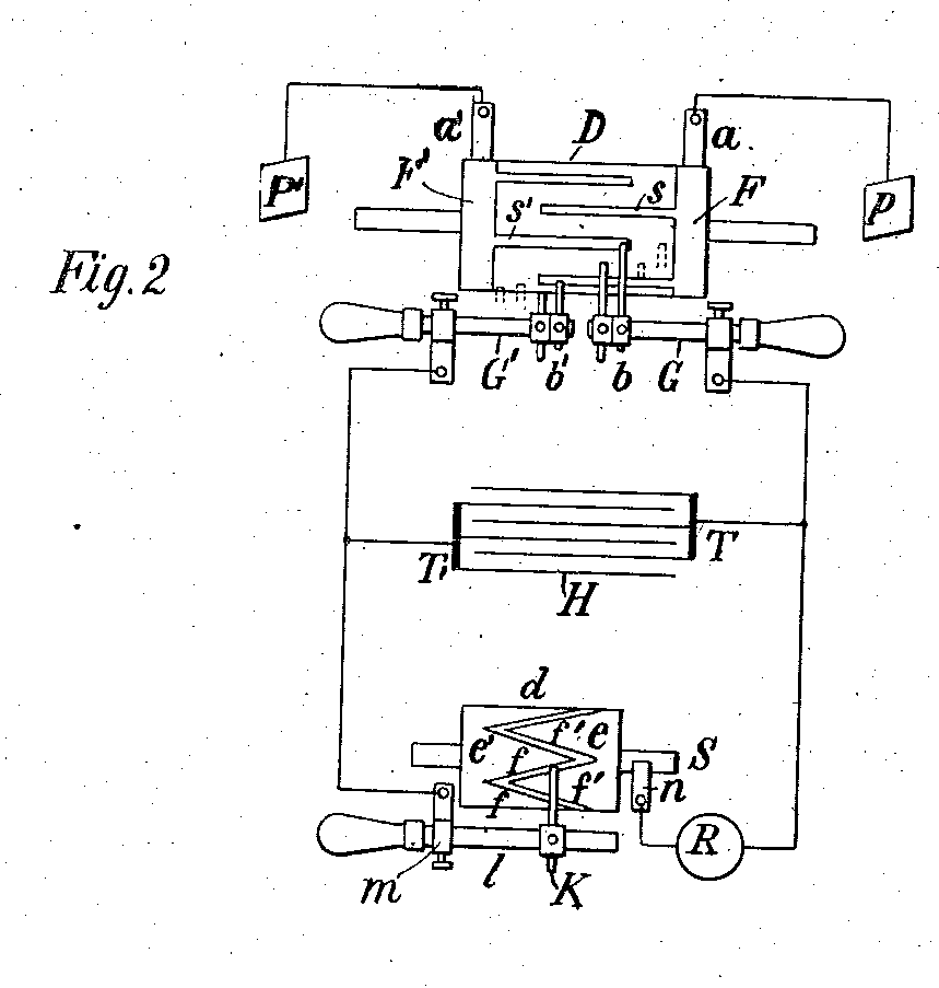 Récepteur décrit dans le brevet 787,412 de TEsla